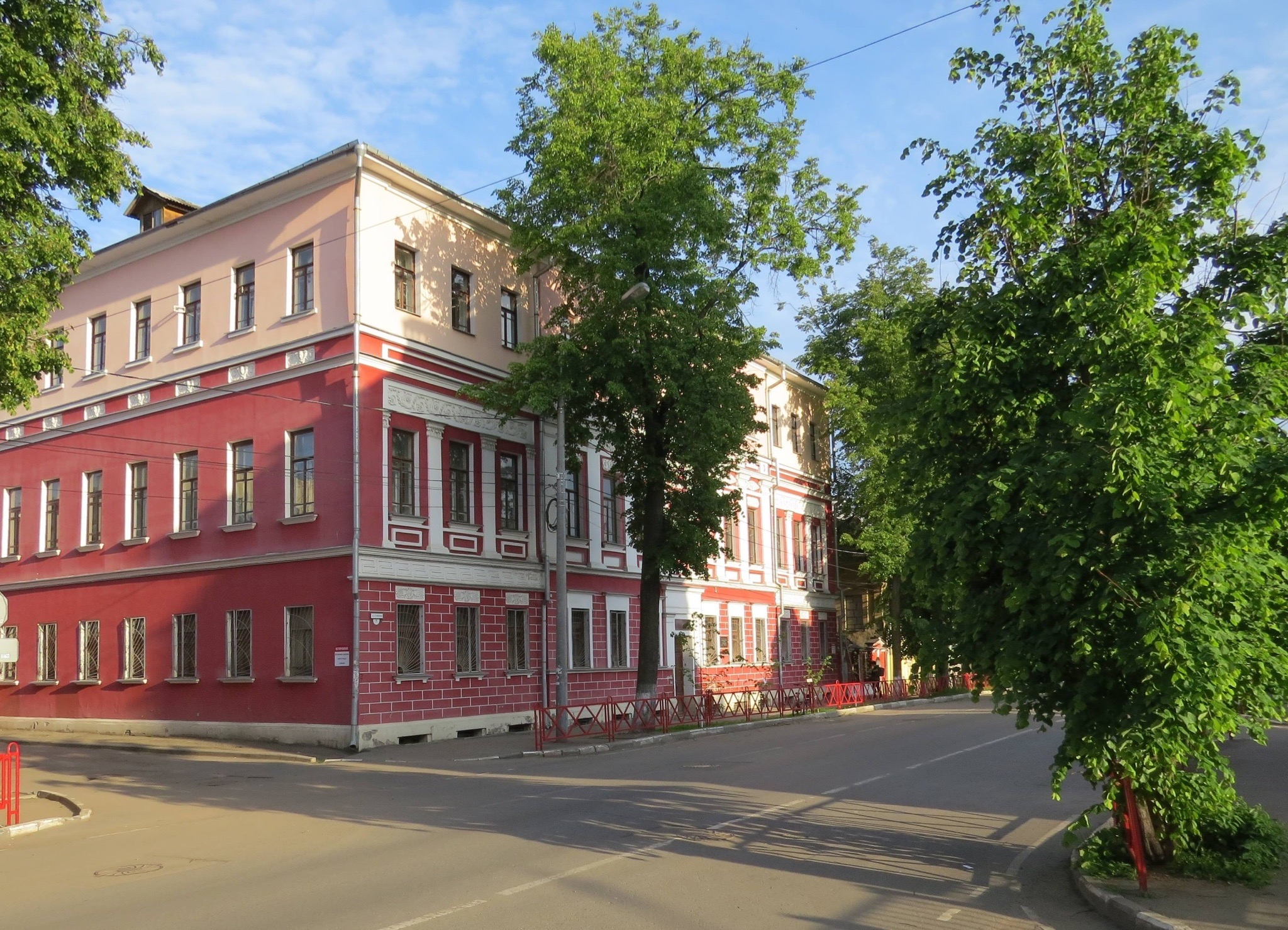 Самый популярный вид здания колледжа - это вот этот, немного перекошенный, но очень красивый!